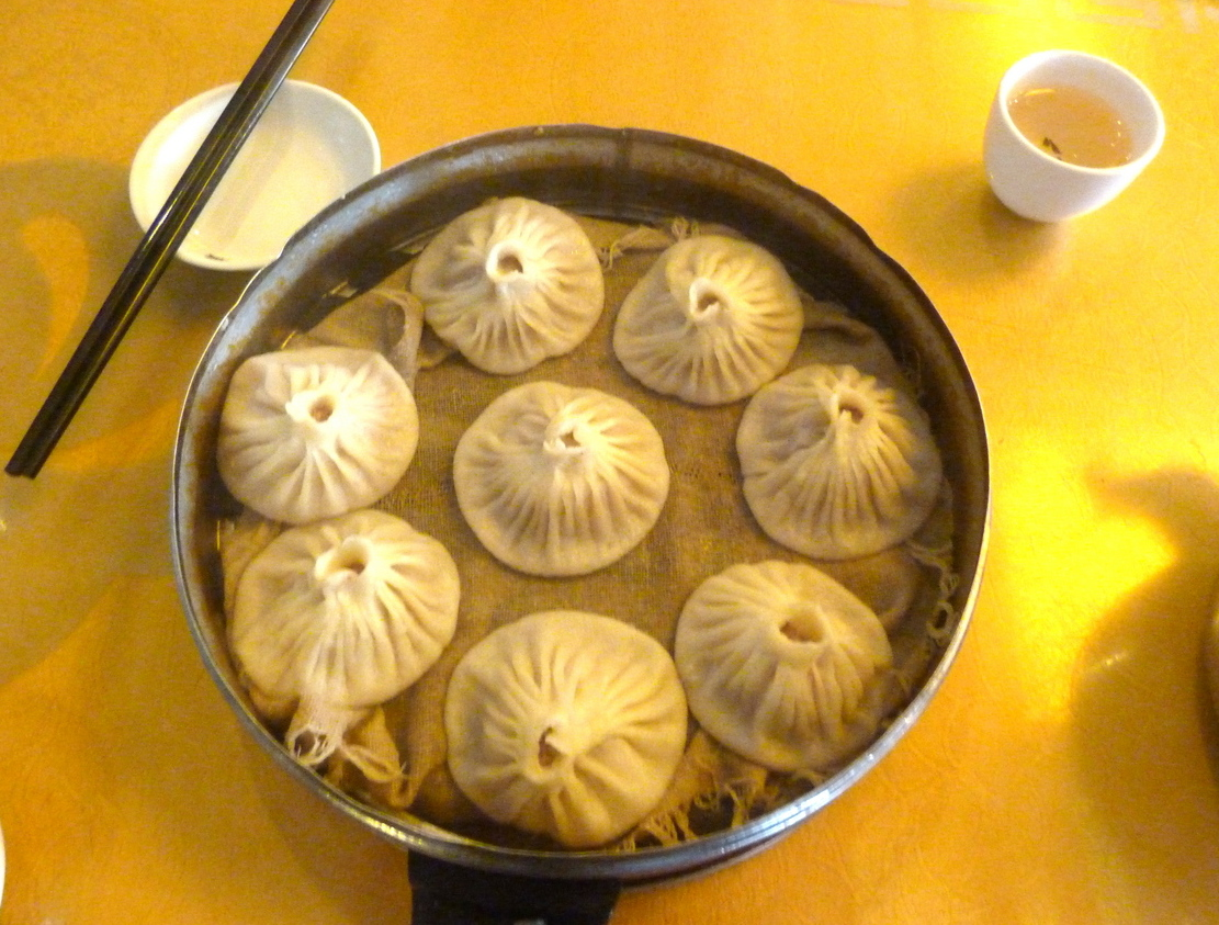 开封第一楼小笼包